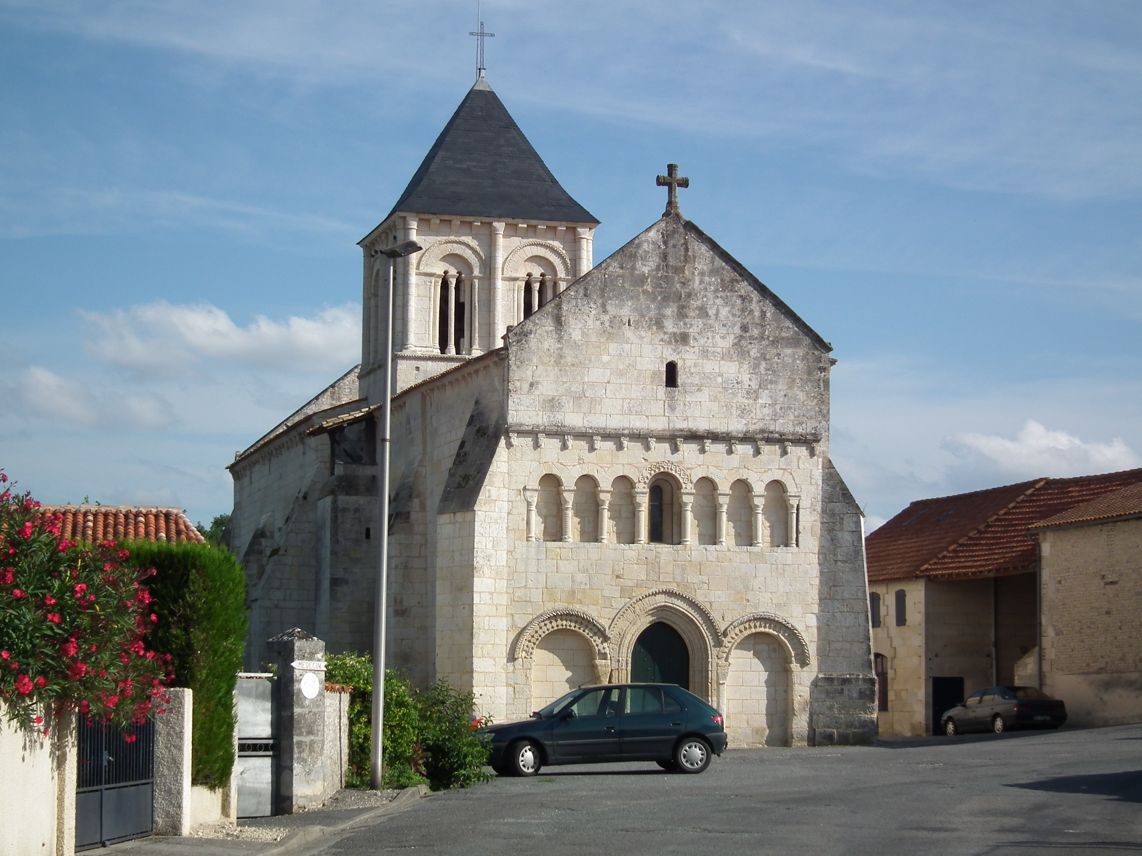 L'église de Réaux